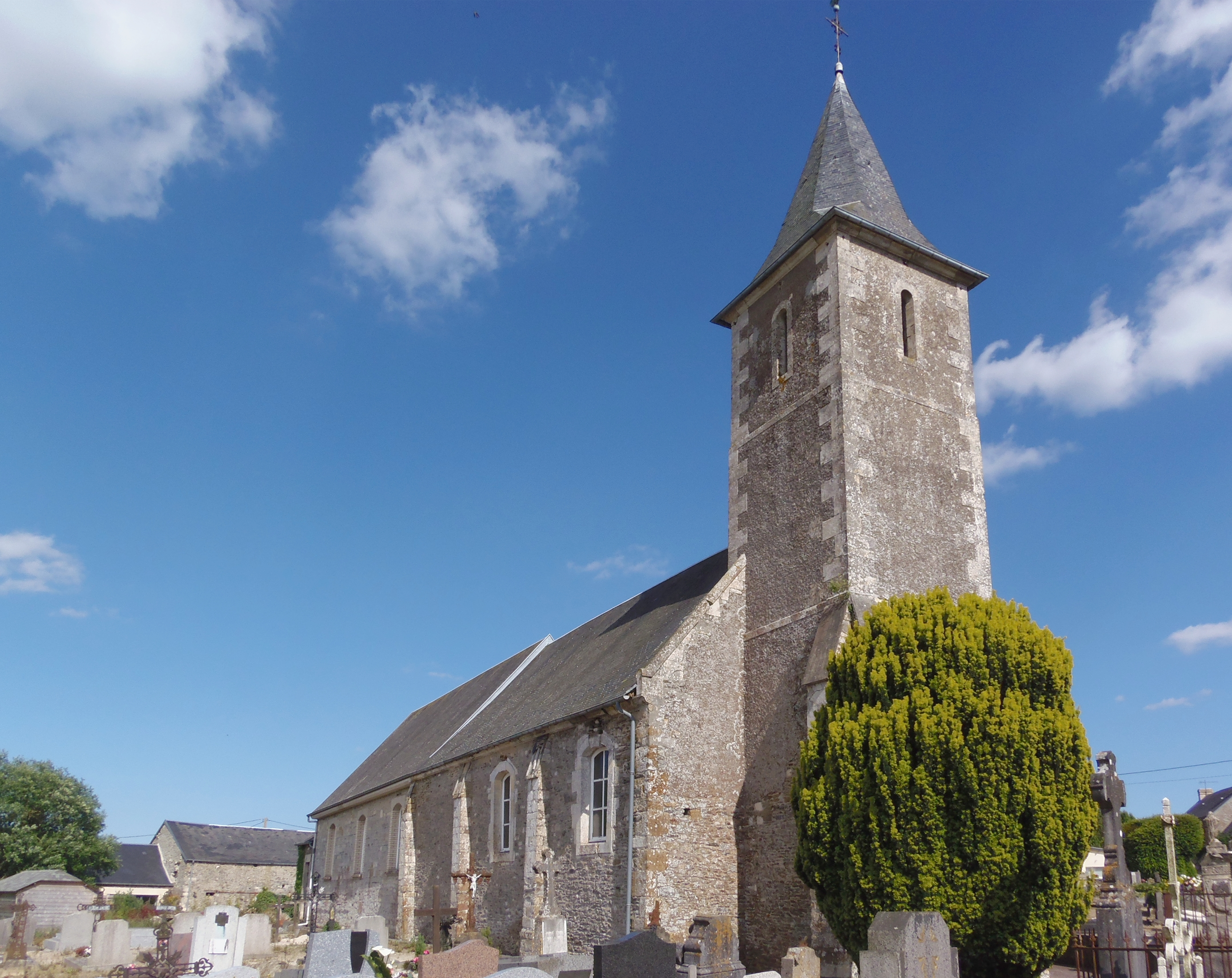 Bonnemaison (Normandie, France). L'église Saint-Martin.